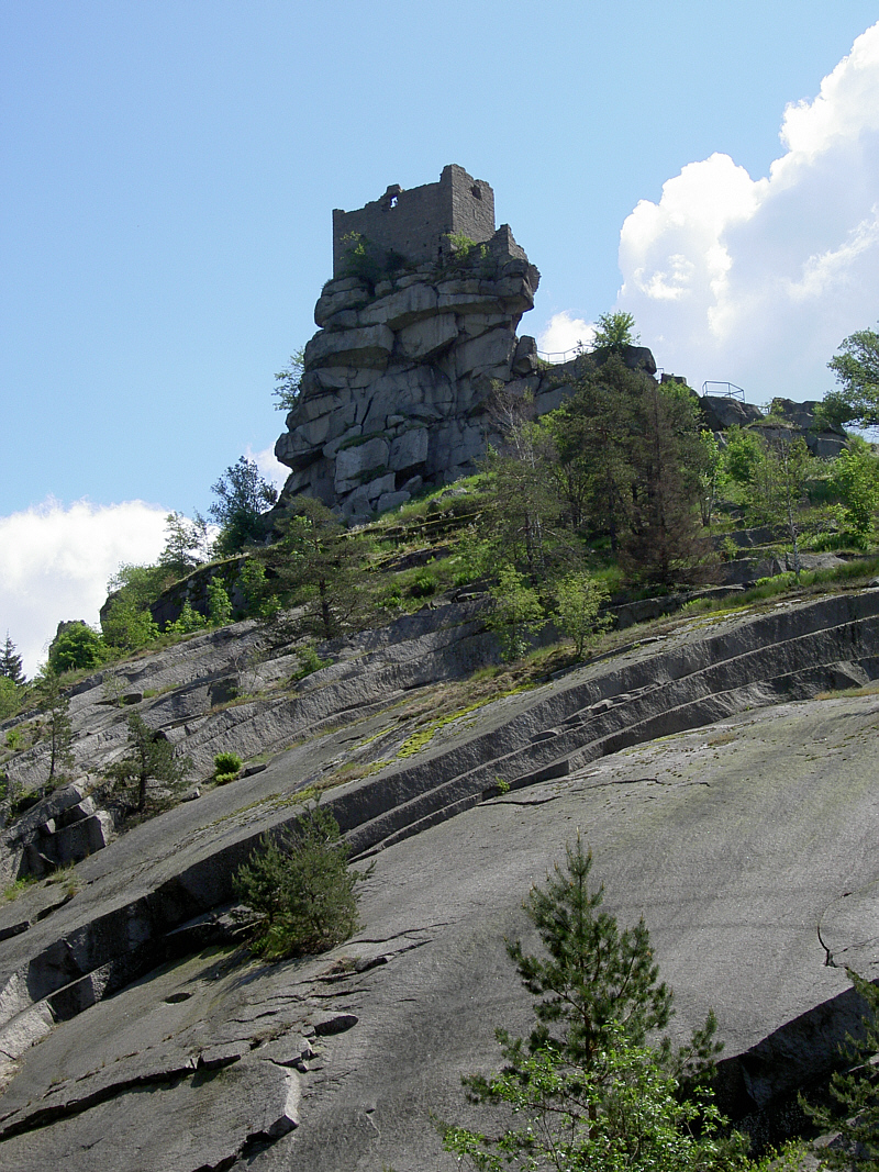 Naturschutzgebiet „Schlossberg Flossenbürg“ mit Ruine Flossenbürg im Oberpfälzer Wald. Der Granit tritt hier zwiebelschalenförmig an die Oberfläche.